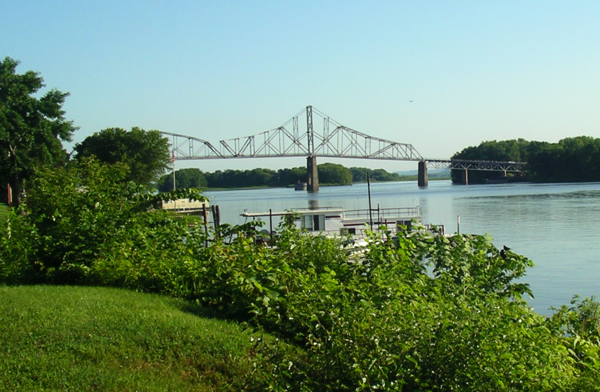 Die Black Hawk Bridge in Lansing, Iowa